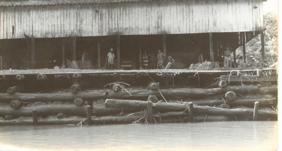 engenho